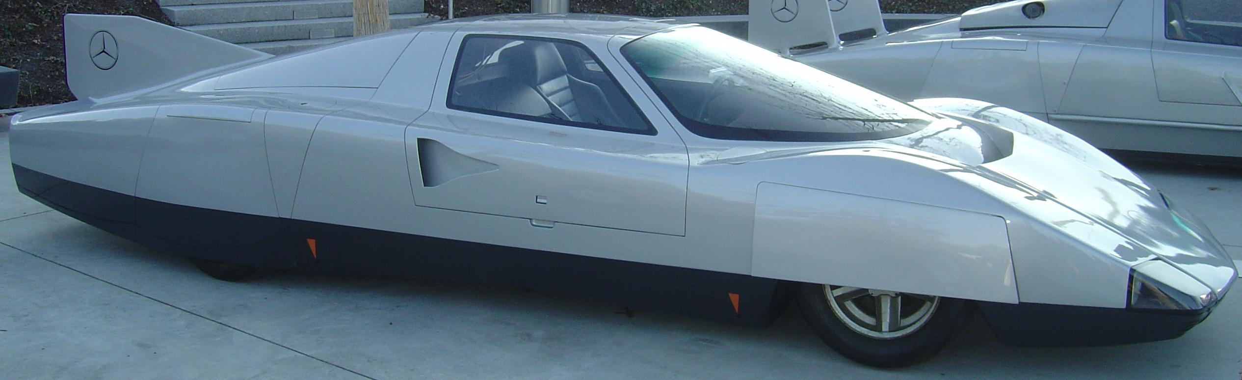 Mercedes-Benz C111-III entstanden im Rahmen von "Stars & Cars" in Stuttgart-Untertürkheim